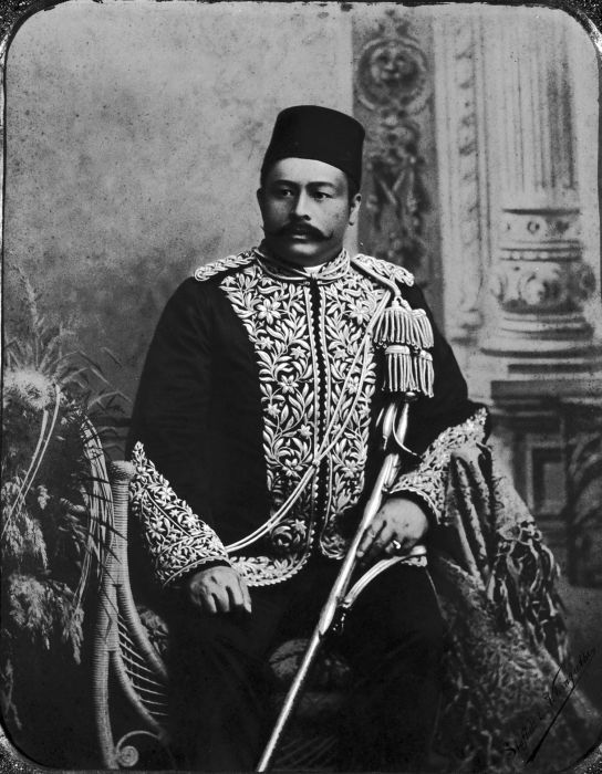 Repronegatief. Studioportret van de Sultan van Asahan, Muhammad Husain Rahmad Syah II